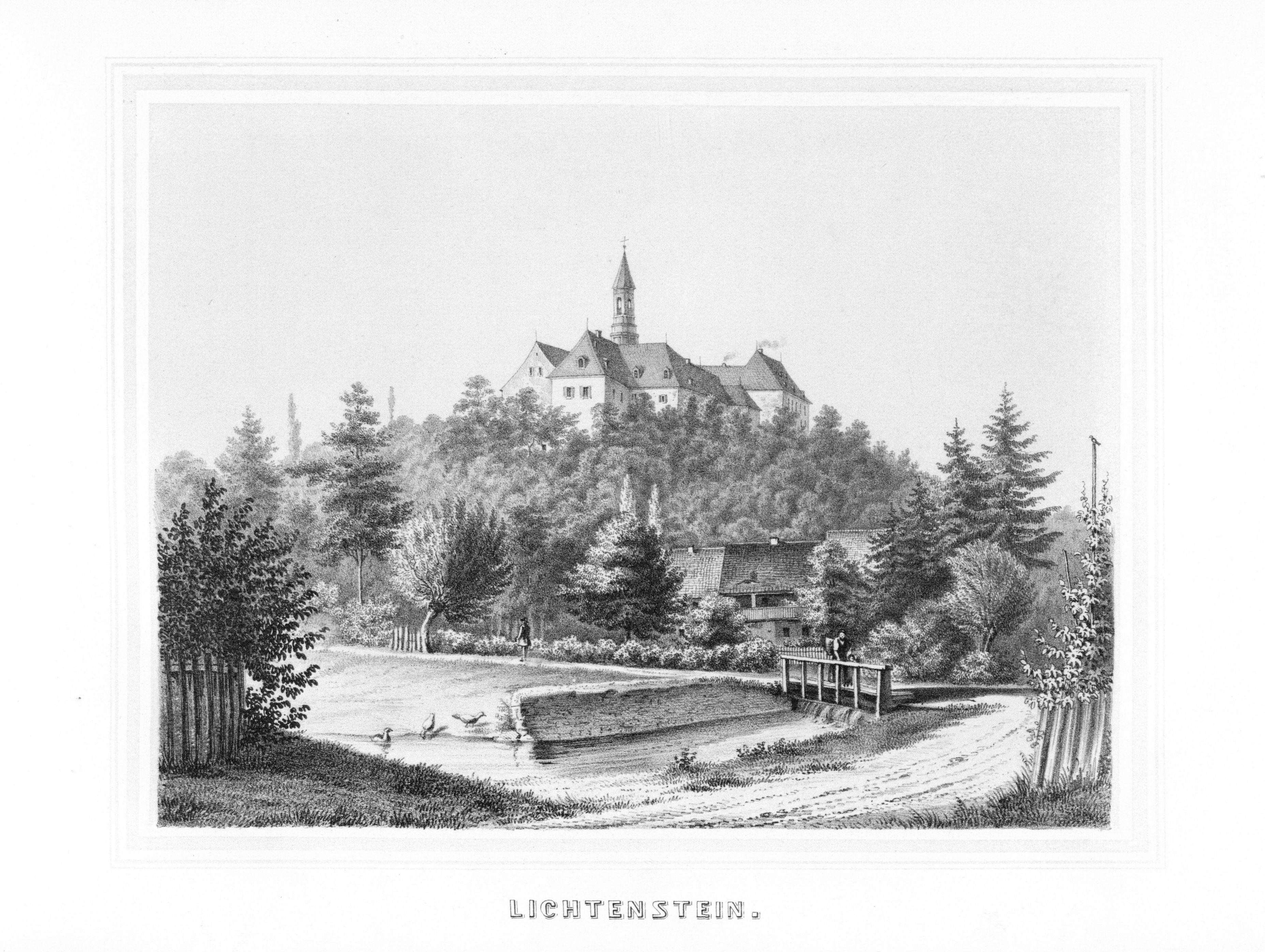 Lichtenstein aus: Album der Rittergüter und Schlösser im Königreiche Sachsen Erzgebirgischer Kreis Section: IV